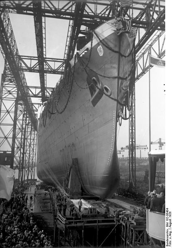 Der feierliche Stapellauf des größten Ozeandampfers "Bremen" fand unter Tanwesenheit des Reichspräsidenten von Hindenburg in Bremen statt. Der feierliche Stapellauf des Ozeanriesen "Bremen". Das gigantische Schiff geht zu Wasser.